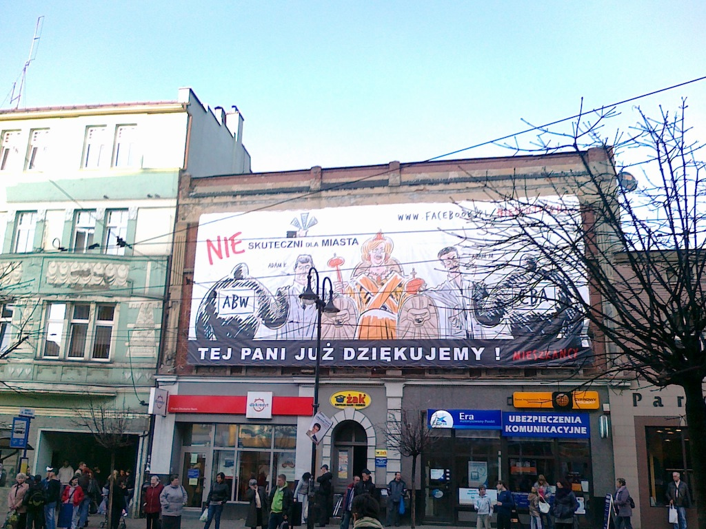 Kontrowersyjny billboard z wyborów samorządowych 2010 wywieszony obok budynku urzędu miasta przy ul. Wolności w Zabrzu.